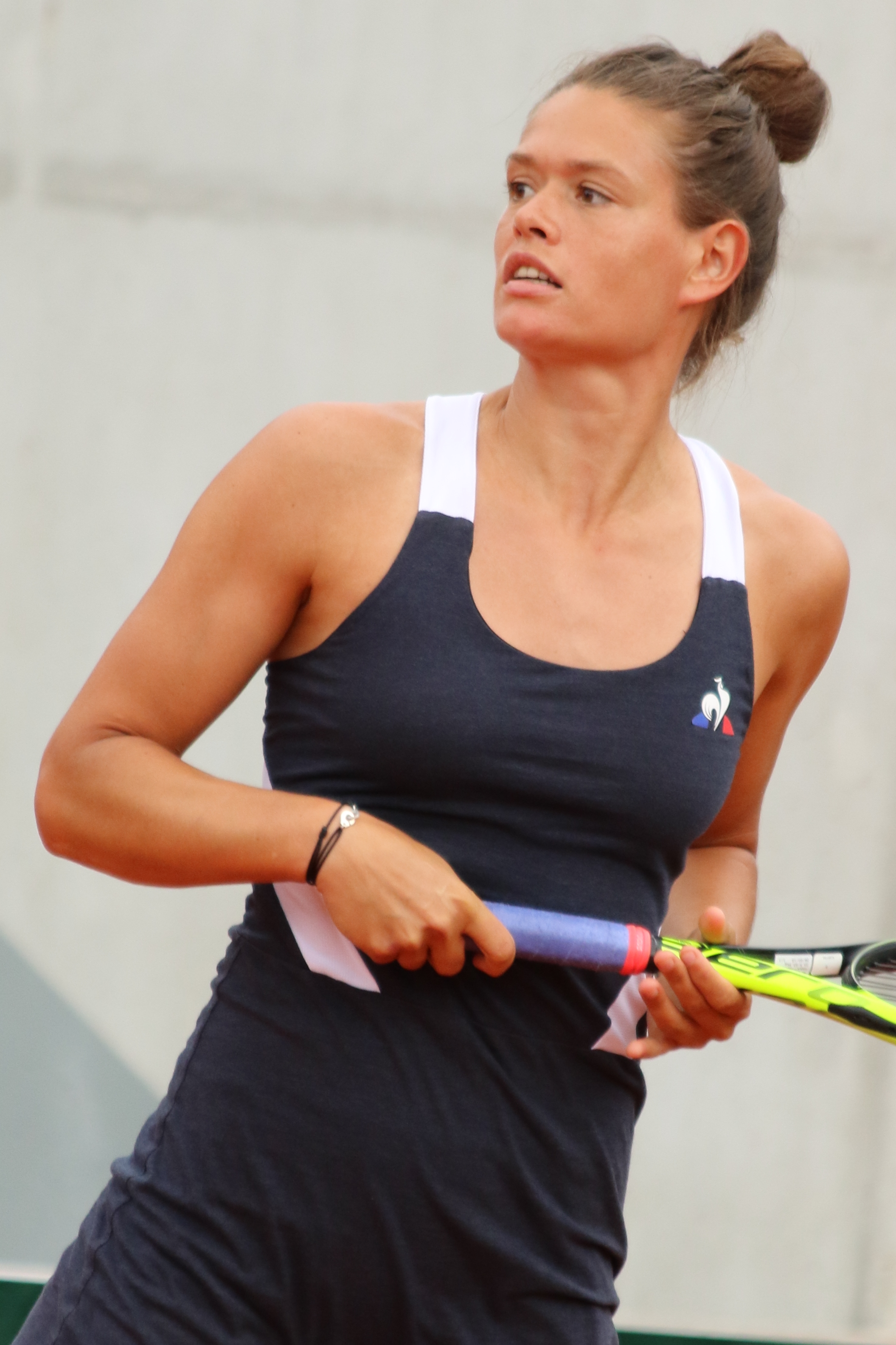 Paquet RG18 (40)